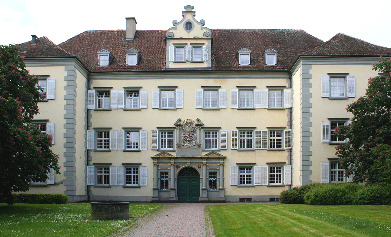 Landgericht Konstanz in Konstanz